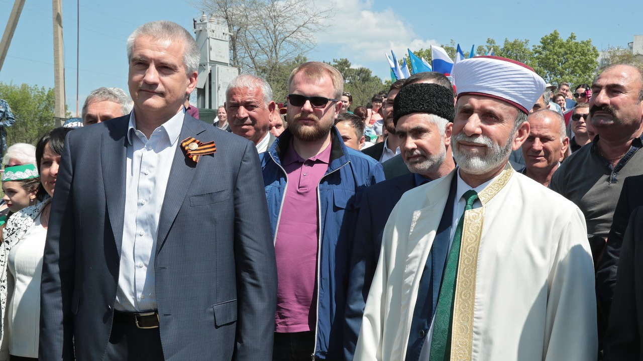 Празднование Хыдырлеза в Бахчисарайском районе Республики Крым